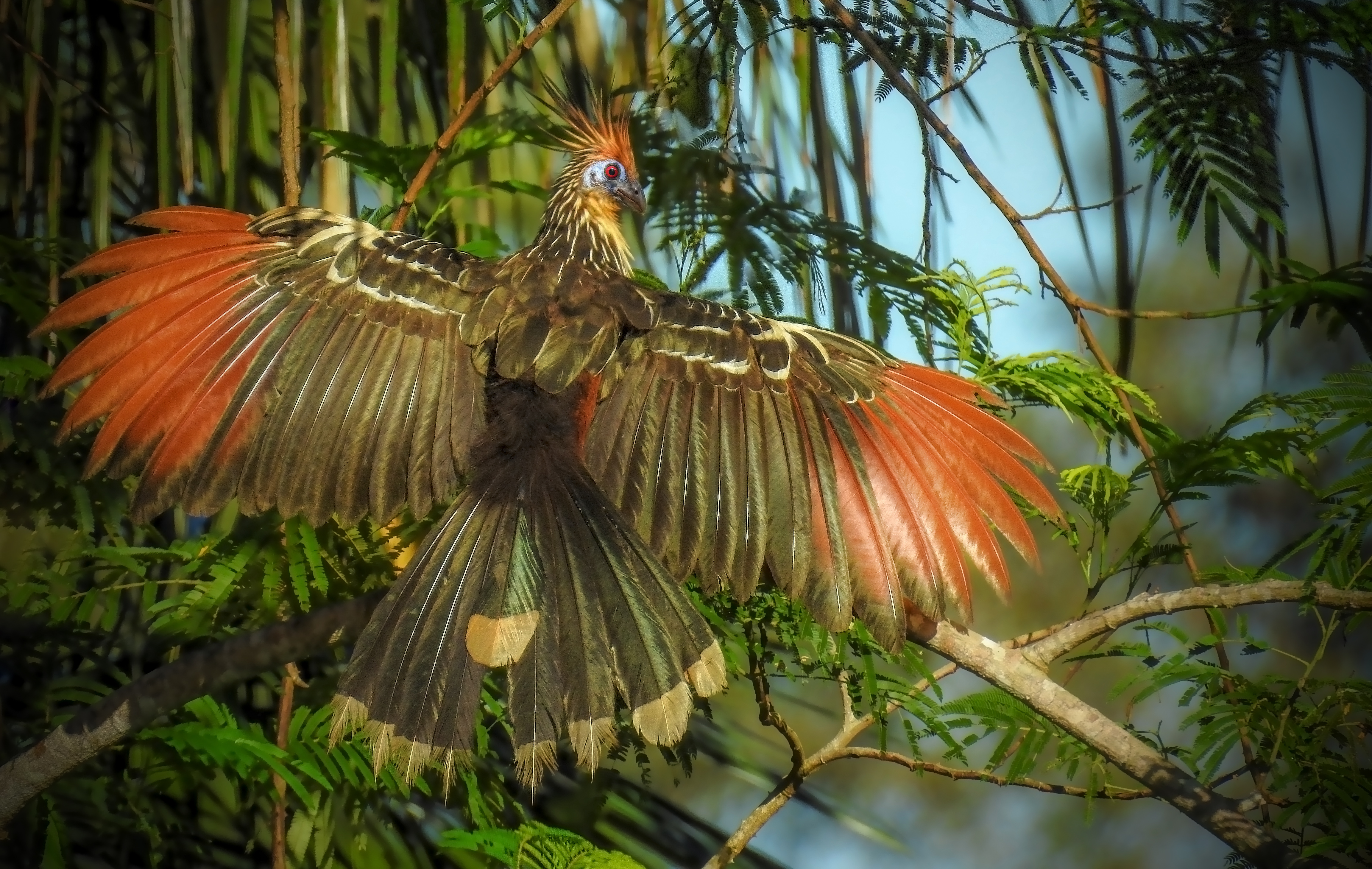 A cigana é conhecida também como jacu-cigano, hoa-zim, cigano, aturiá e catingueira, em função do odor desagradável que exala, resultante da fermentação da matéria vegetal durante a digestão.